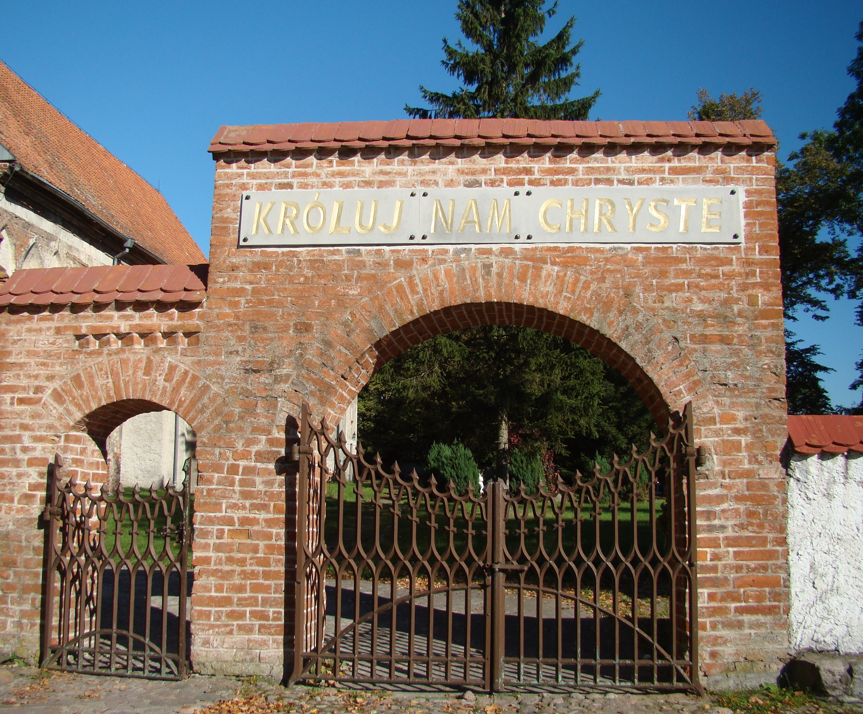 kościół parafialny p.w. Chrystusa Króla nr. NID woj.warmińsko- mazurskie 43 z 27.06.1953